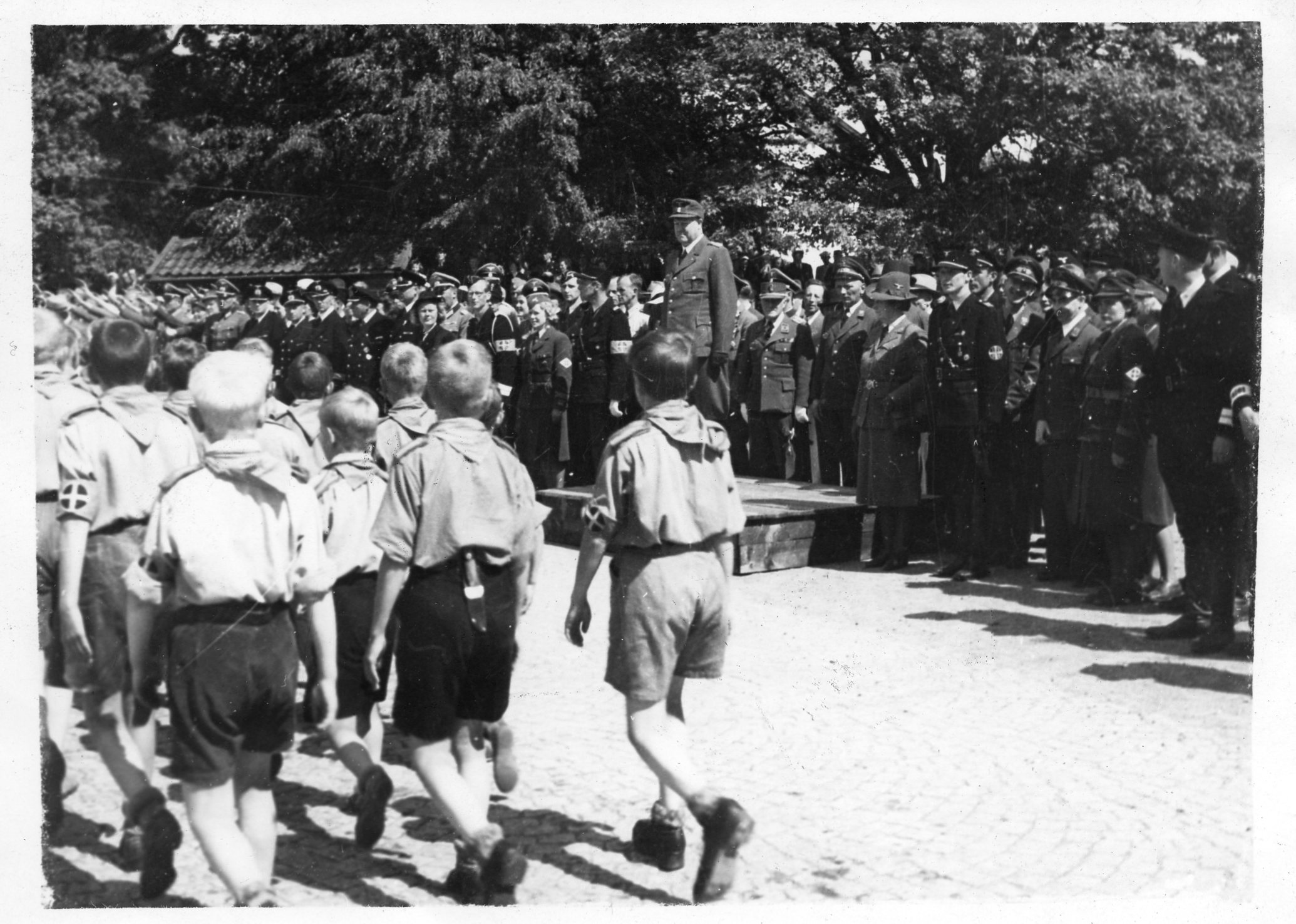 RA/RAFA-3309/U 38A/3/ 38-3-4 img120